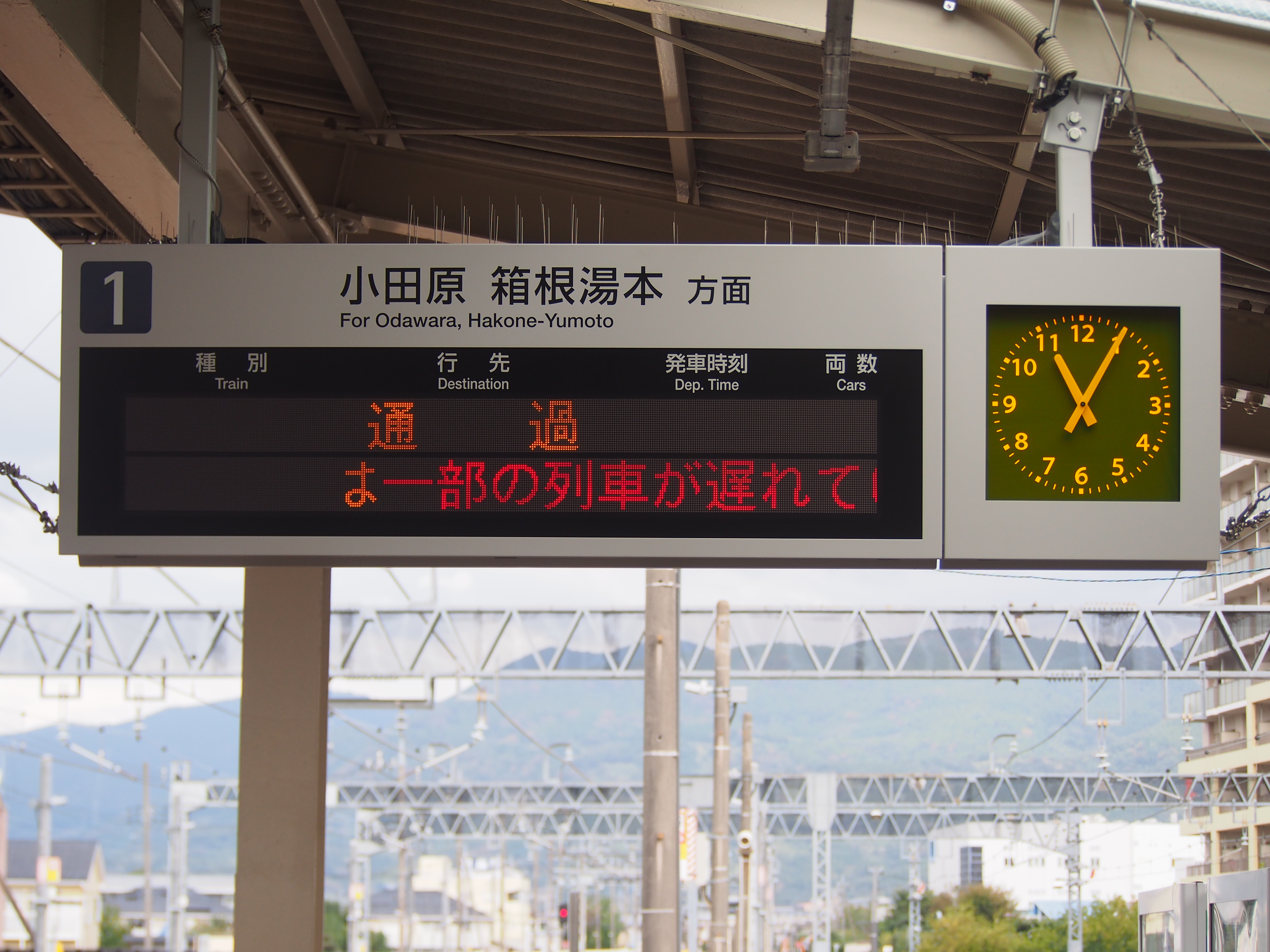 下りホームに設置された新型の案内表示器